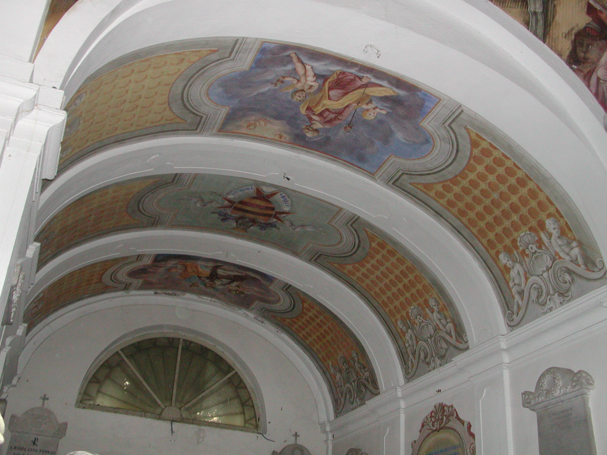 Particolare di pittura all'interno della cappella Tommasi (Livorno,Italia)